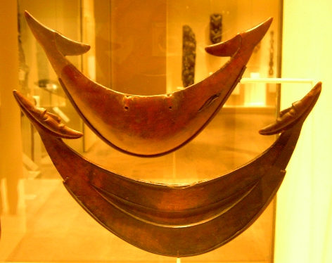 Zwei Rei-Miro (vorderes Exemplar Vorderseite, hinteres Exemplar Rückseite) aus der Sammlung des Metropolitan Museums New York City